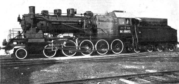 Паровоз М160-001